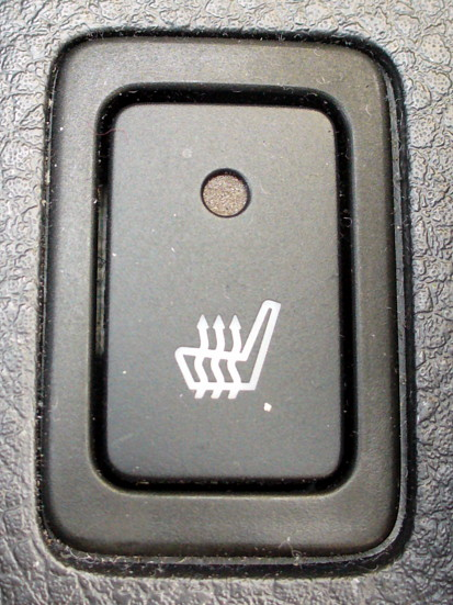 Sitzheizung eines Suzuki SX4 Dance